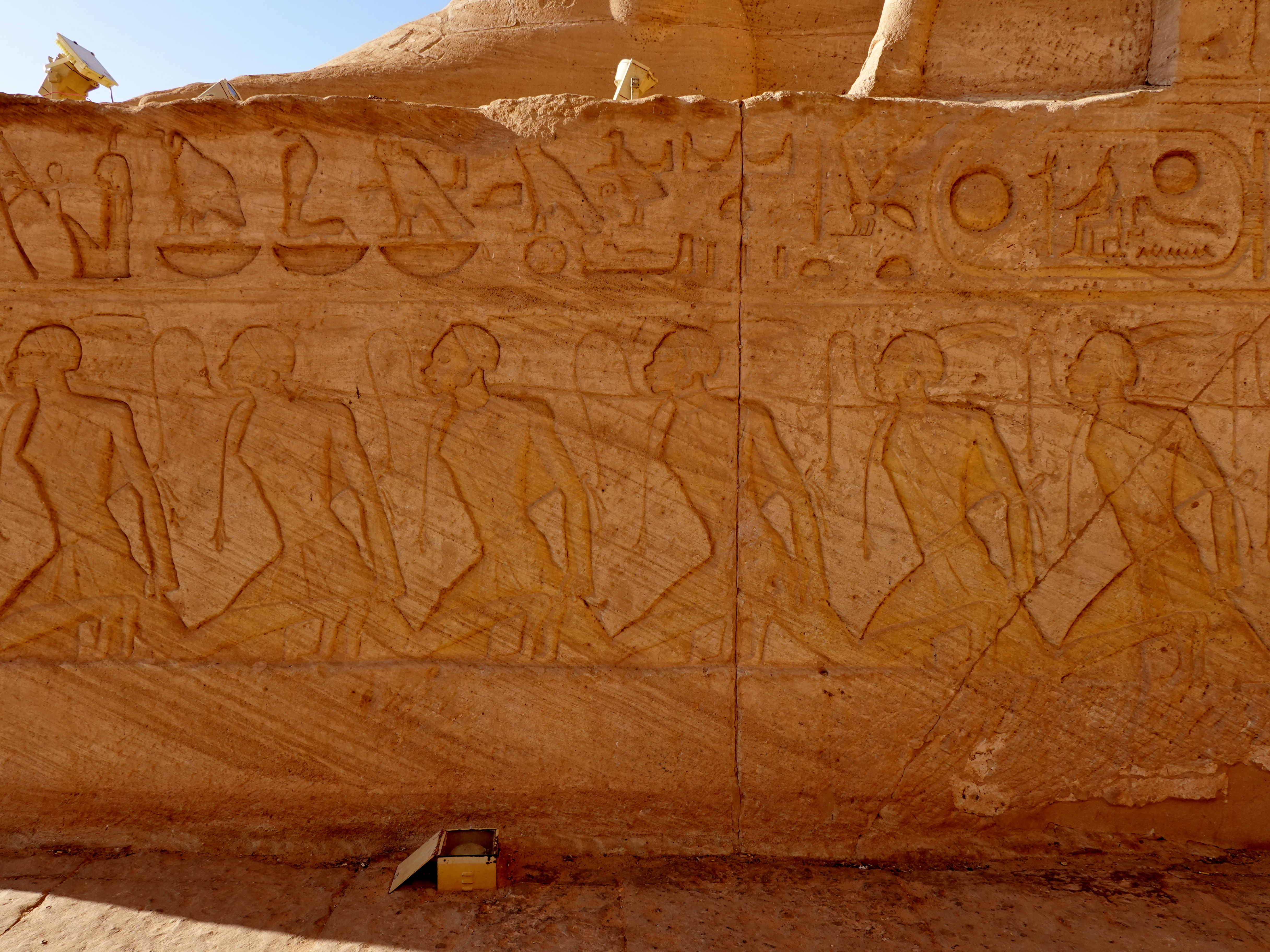 Relief nubischer Gefangener am südlichen Eingangsbereich des Großen Tempels von Abu Simbel, Ägypten